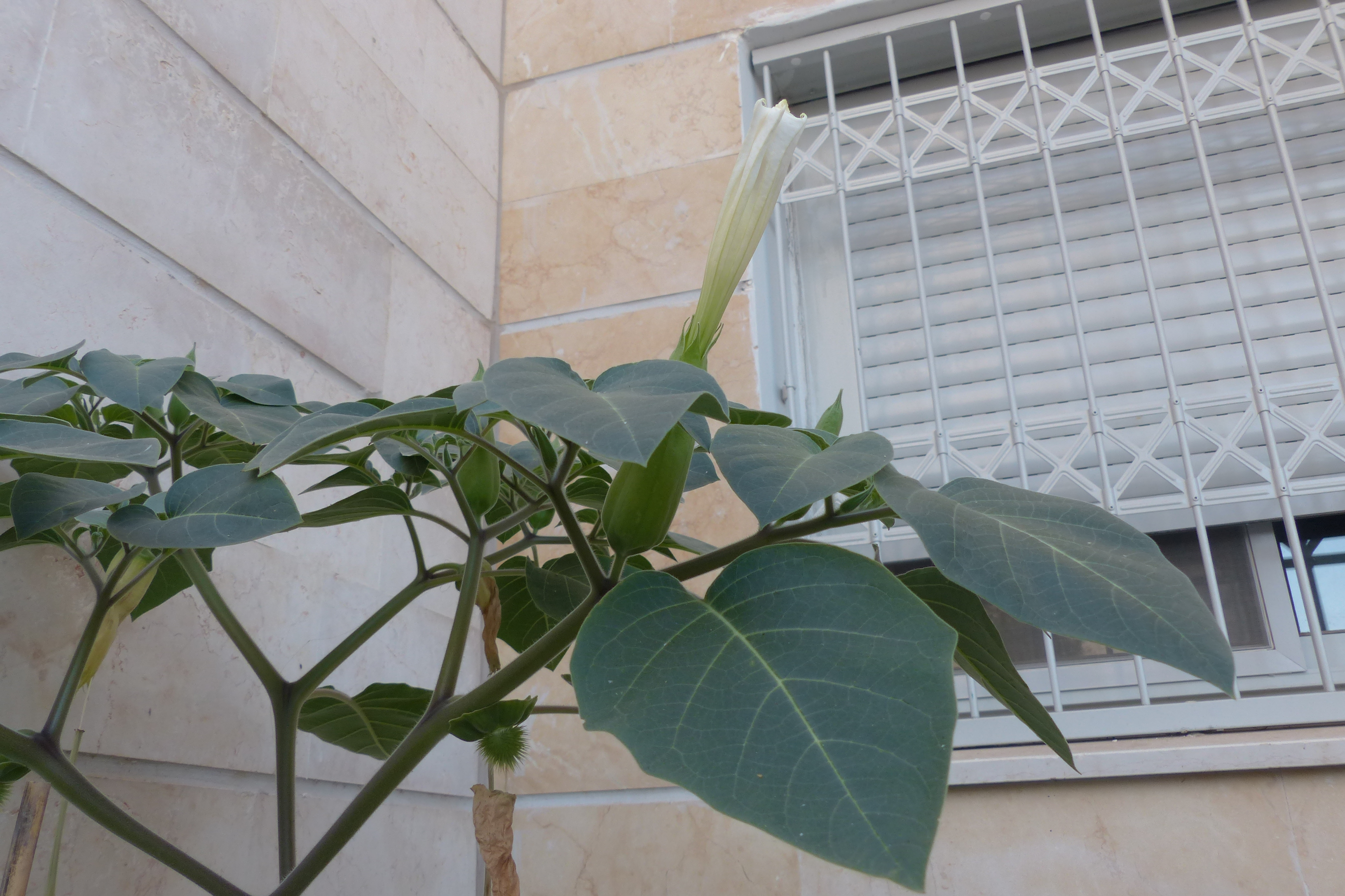 פרח הדטורה בעת בקיעתו מתרמיל הגידול שלו